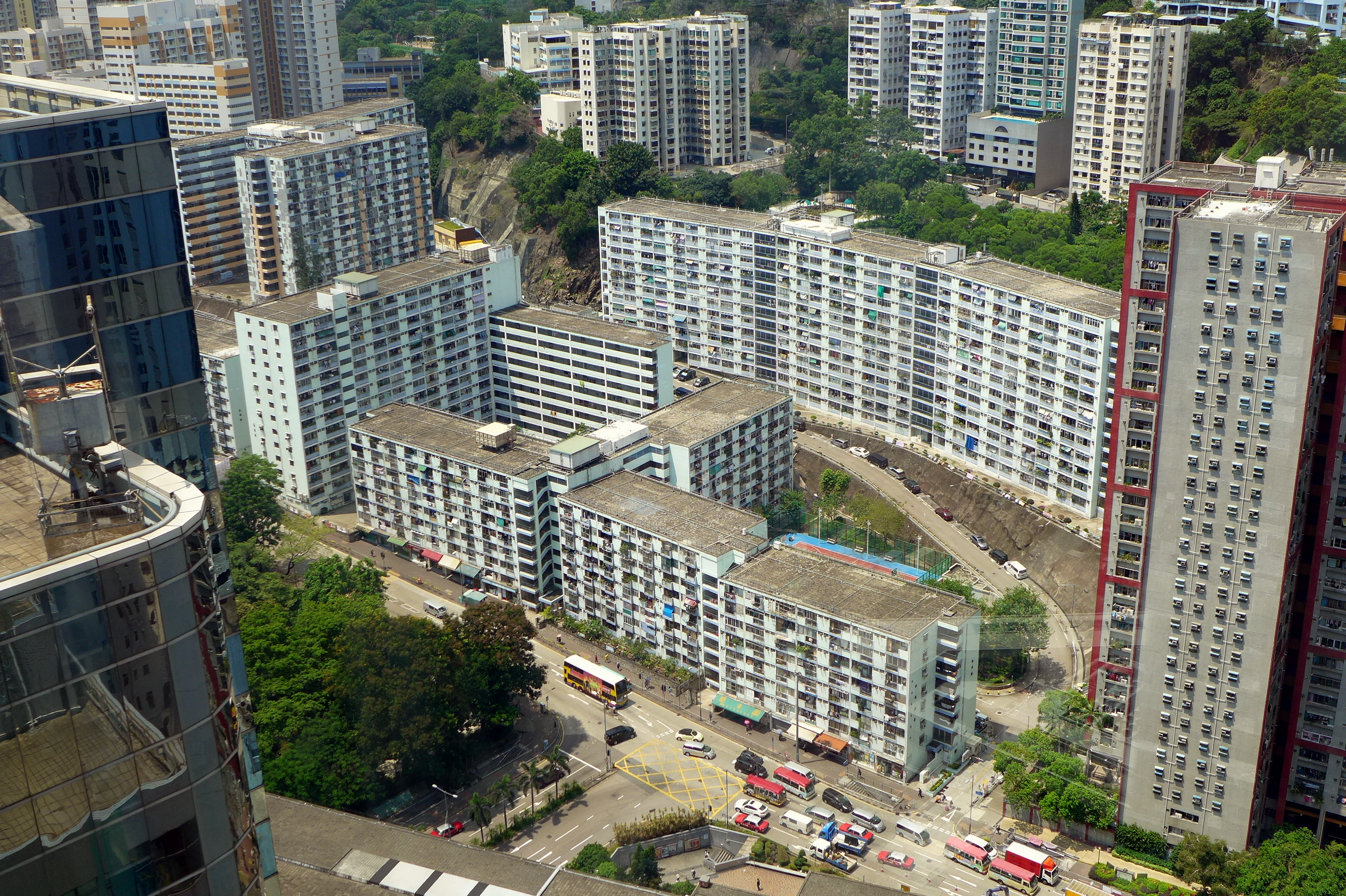 Kwun Tong Garden Estate